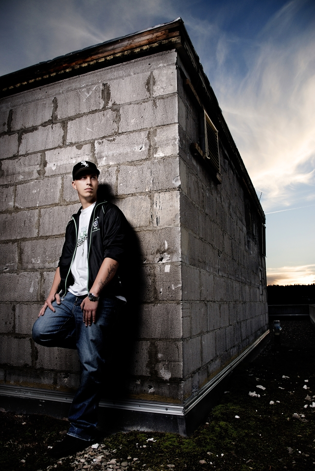 Promofoto von Screwaholic